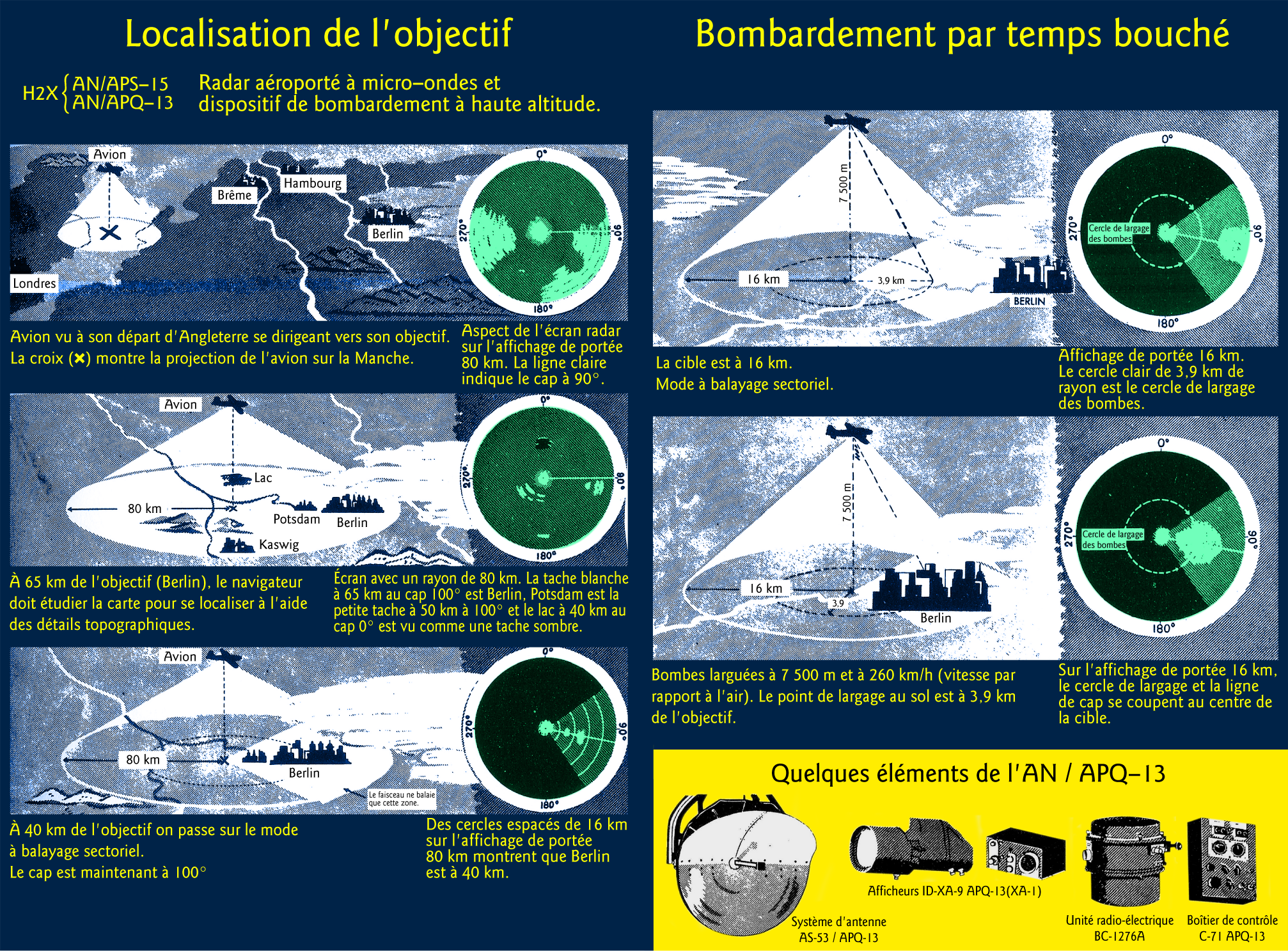 Initial Upload